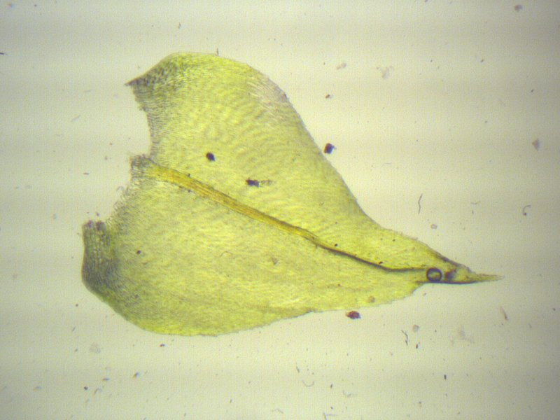 Kleines Schönschnabelmoos (Eurhynchium hians), Gragetopshof, etwa 40x vergrößert